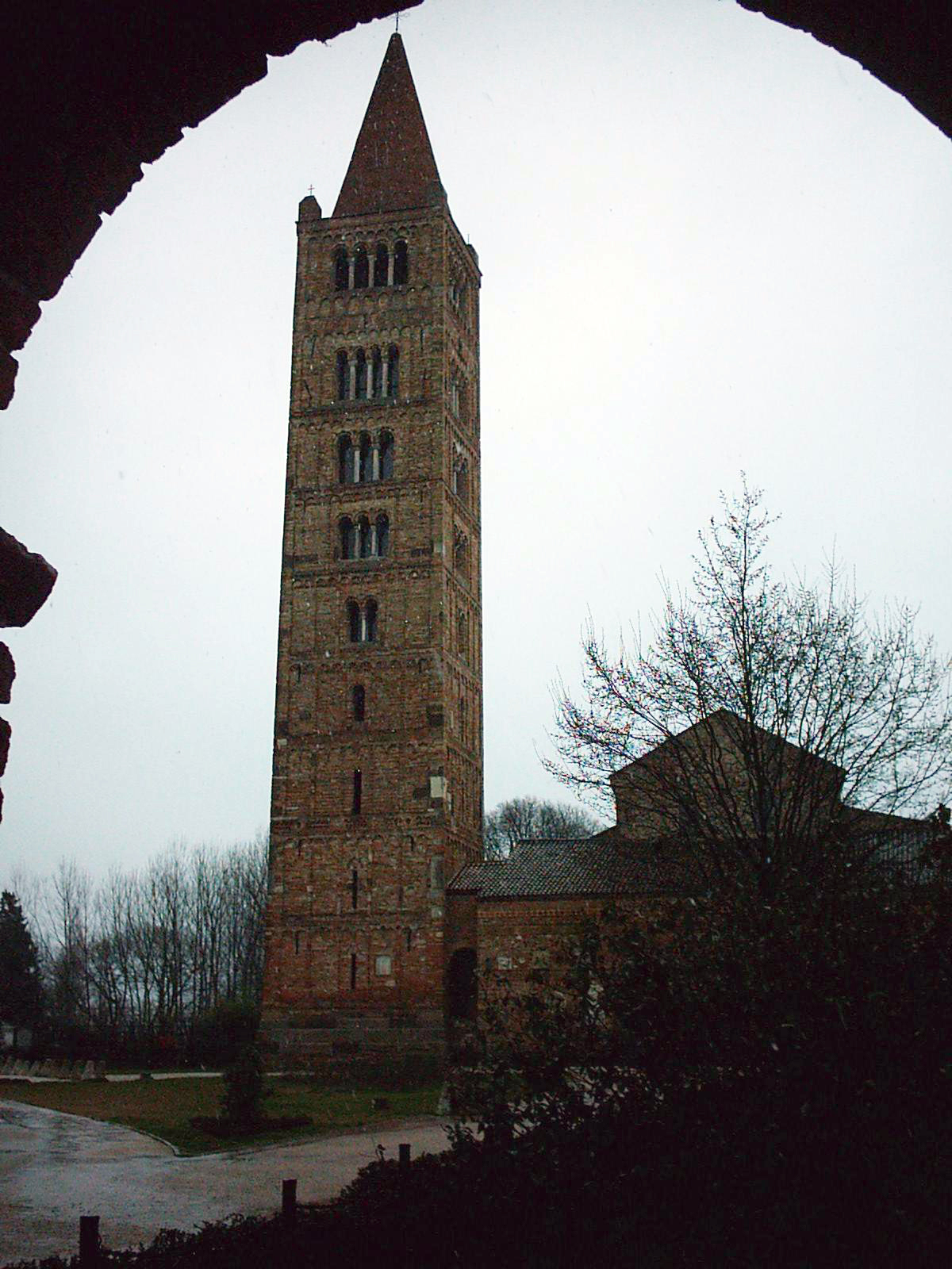 Campanile dell'Abbazia_di_Pomposa, Codigoro, Ferrara, Italy